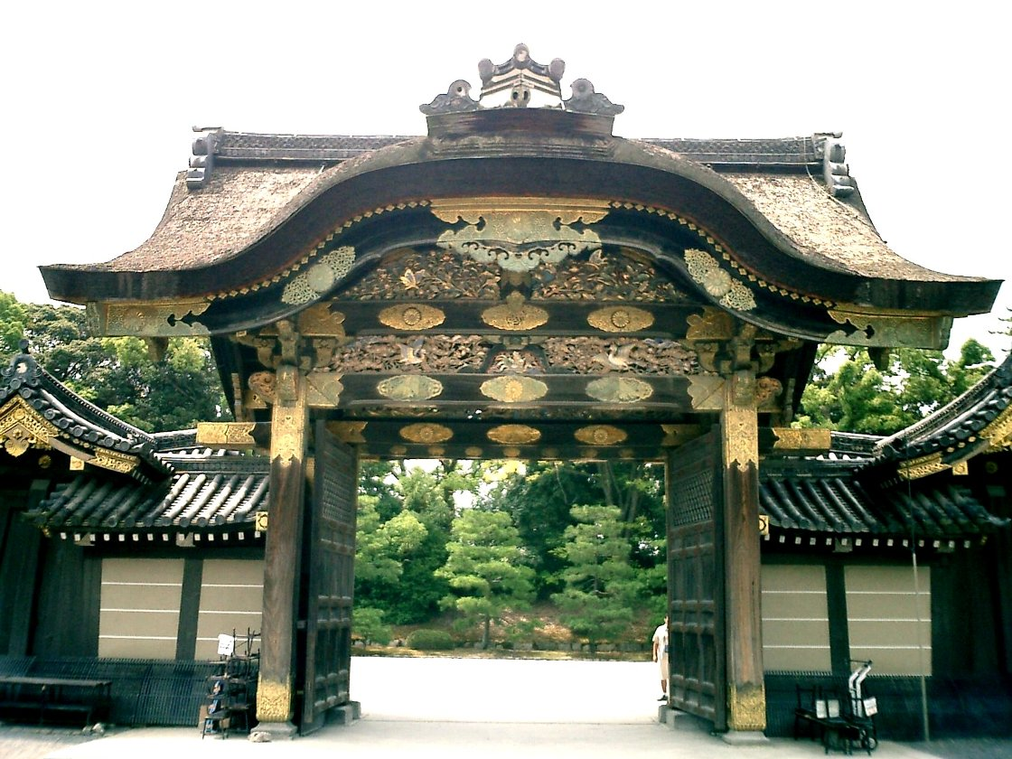 Nijo_Castle_Karamon